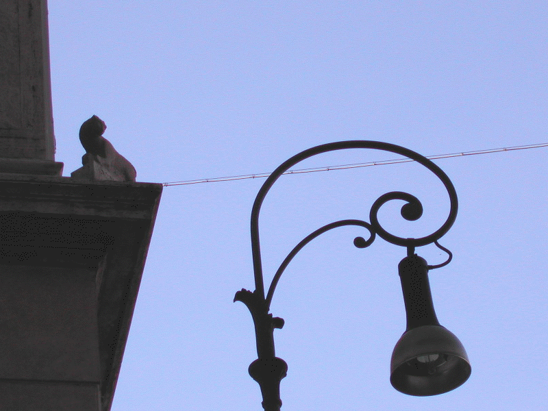 Roma, via della Gatta: la gatta del nome. In realtà si tratta probabilmente di un reperto proveniente dal vicino Iseo Campense